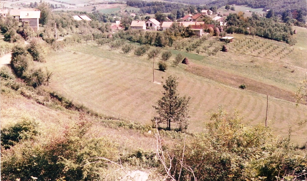 Кордунски Љесковац - погледа ка Растовцима